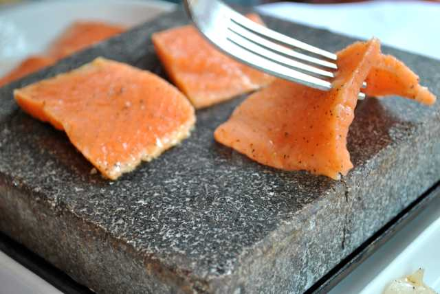 Grillades de saumon sur pierrade